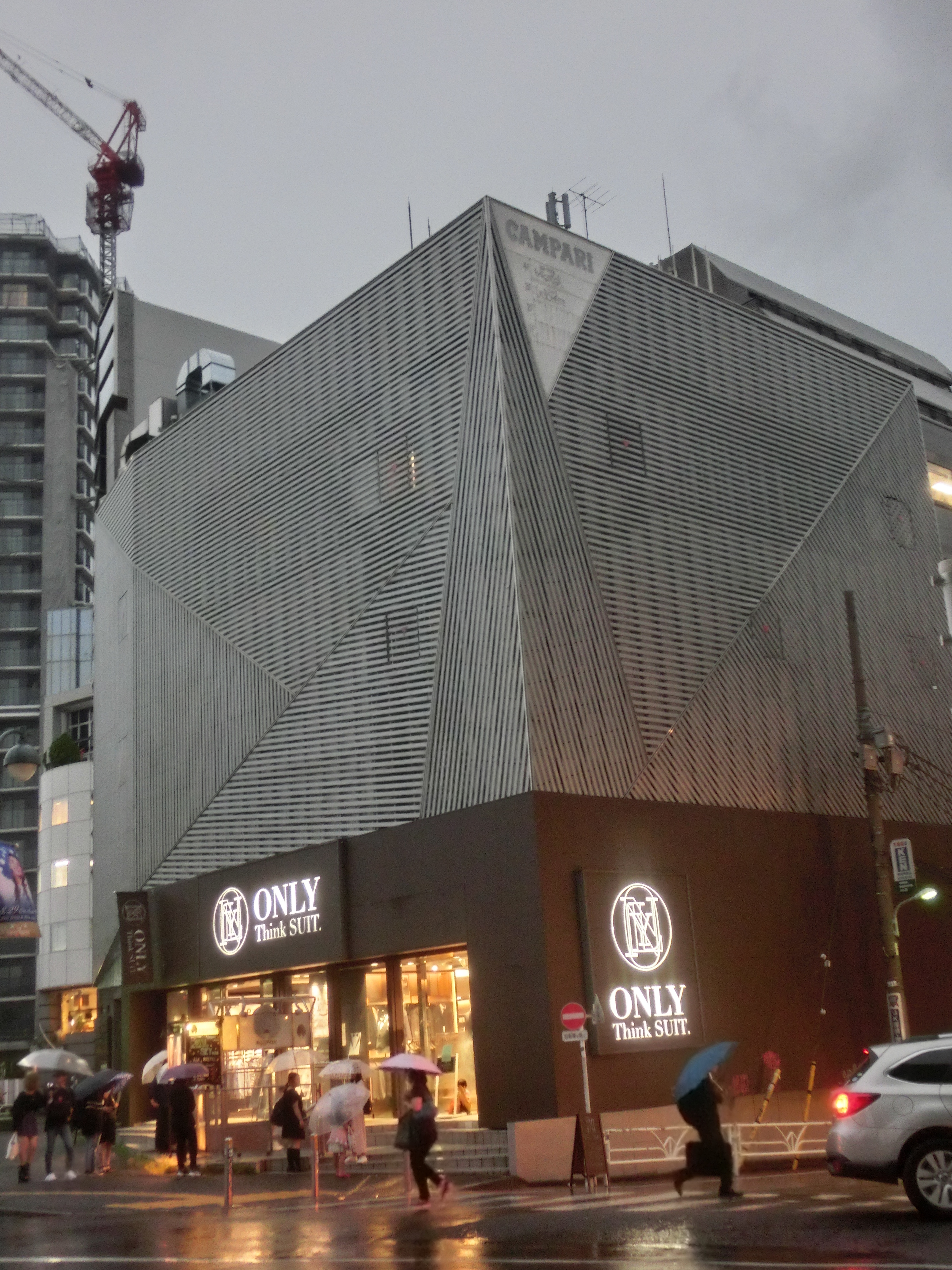 渋谷エッグマン